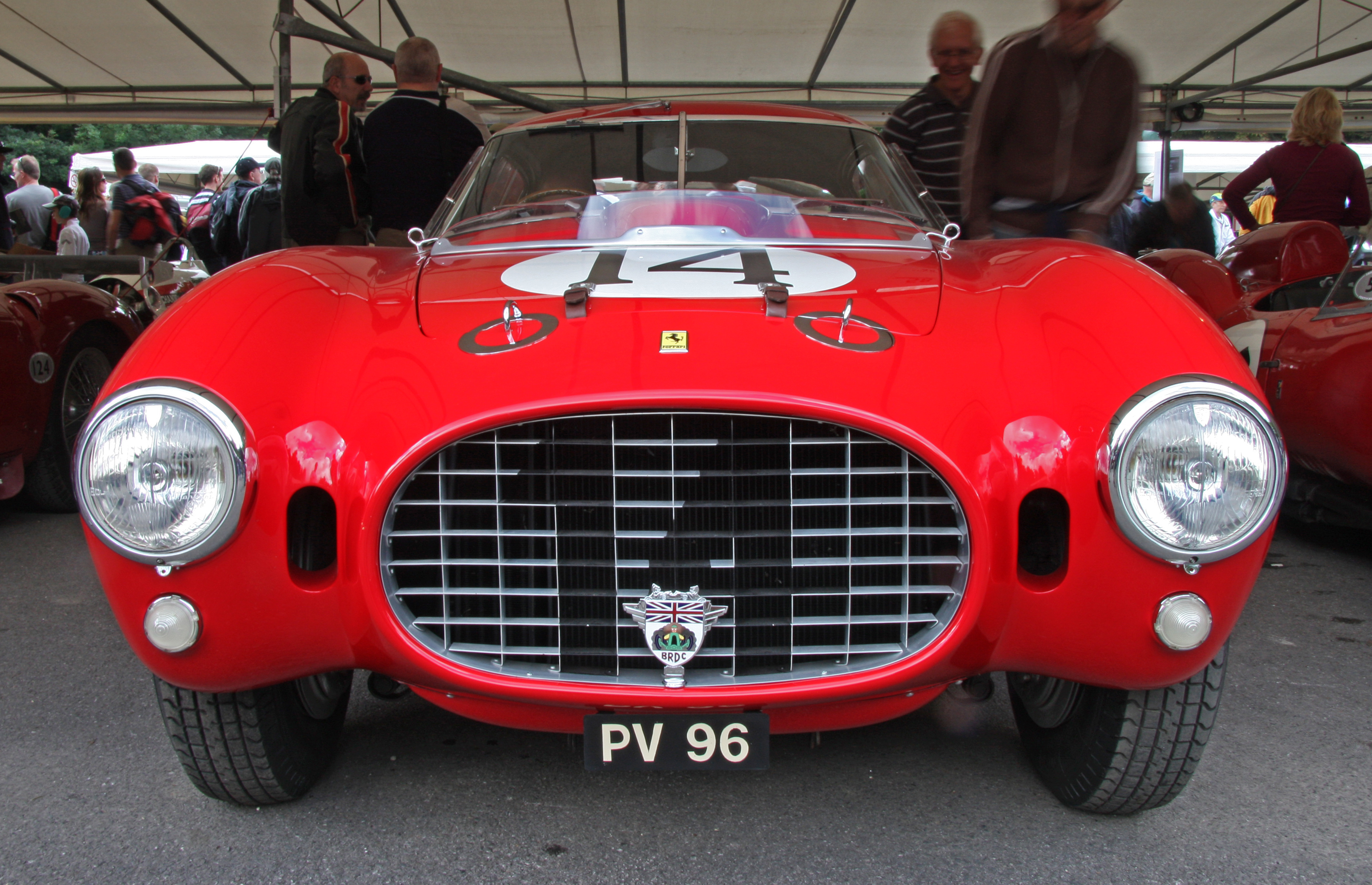 Built 1953. 4.5 litre V12